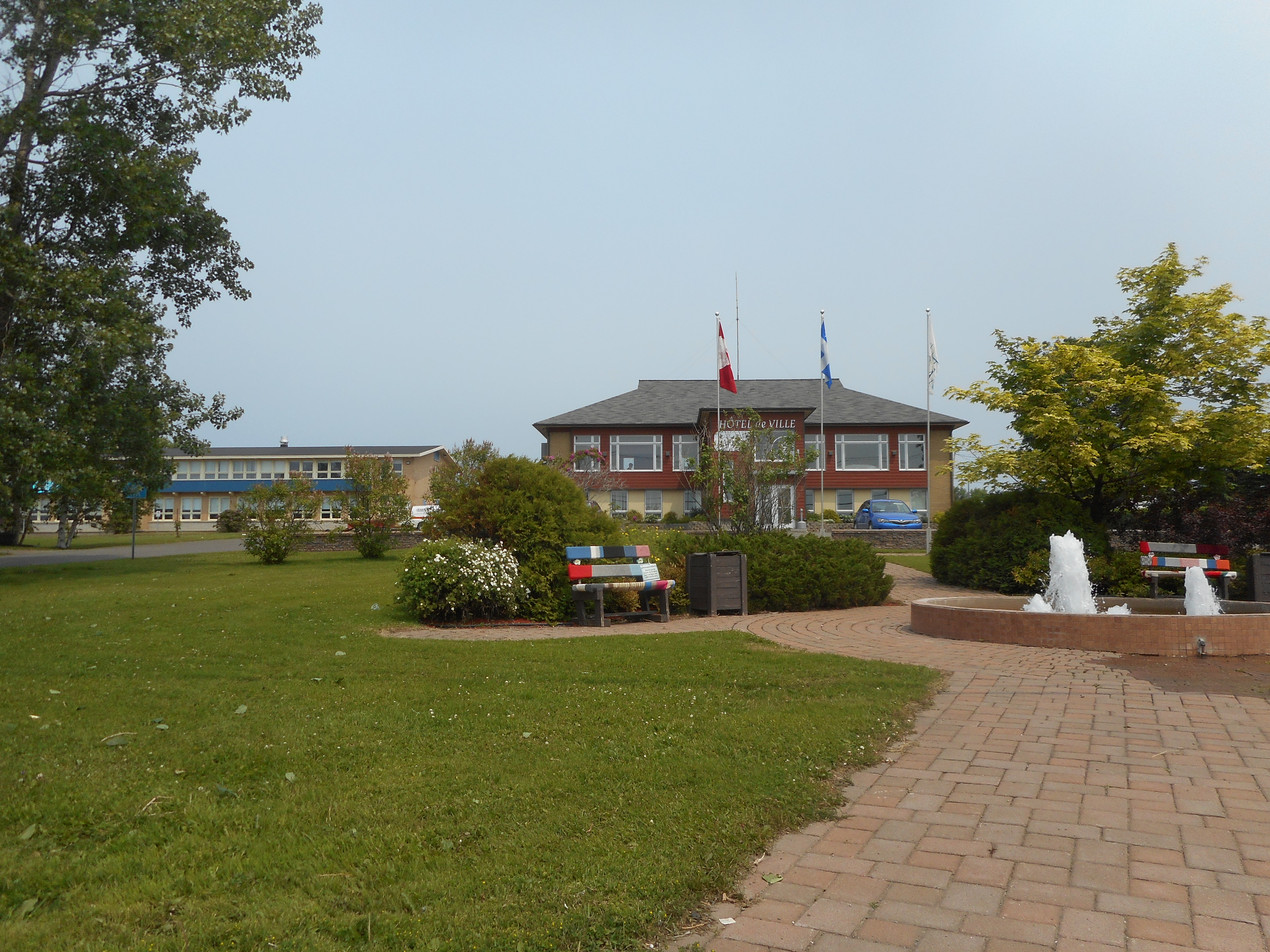 Hôtel de ville de Caplan, 17, boulevard Perron Est, Caplan, Québec